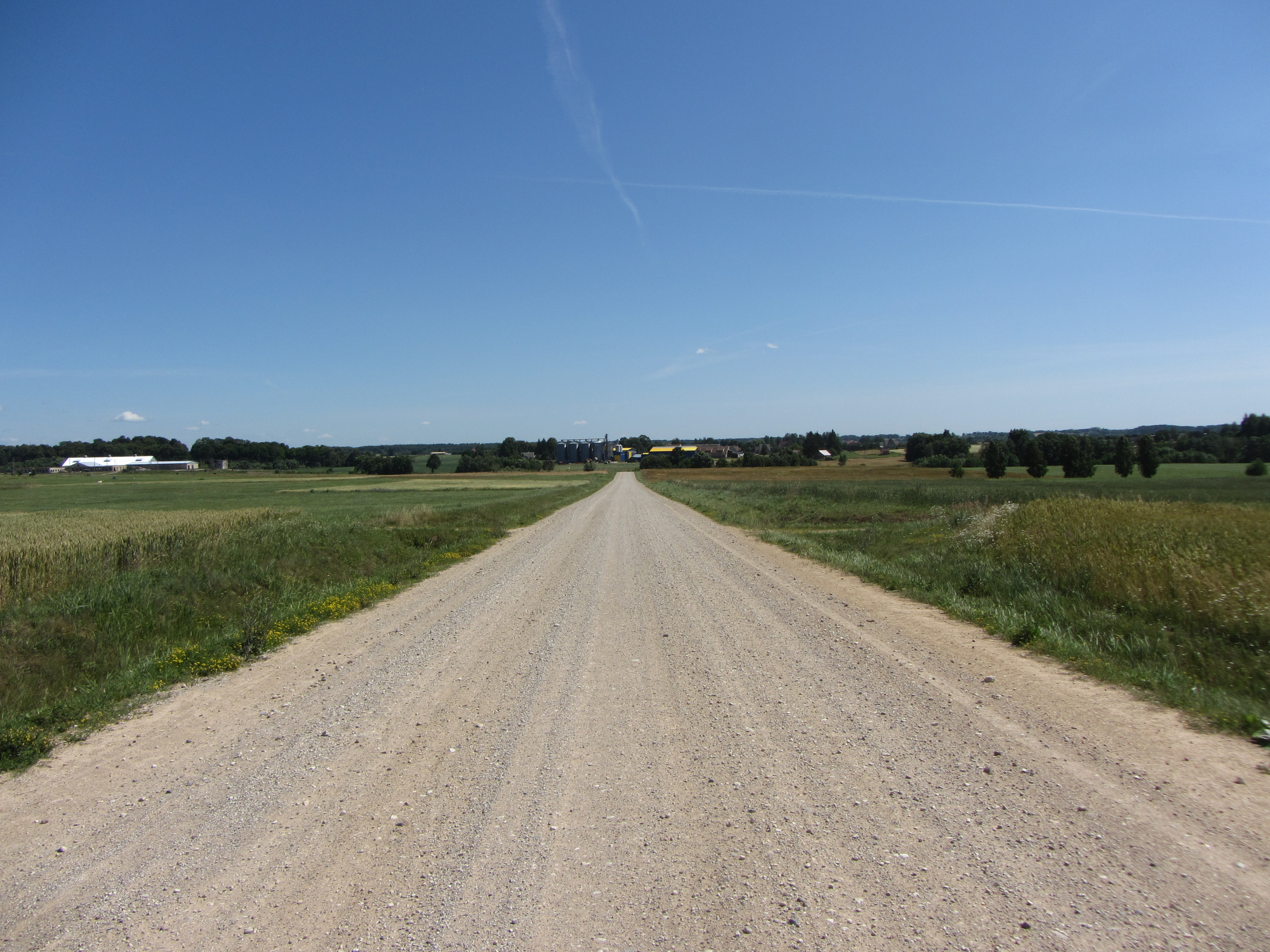 Gilučiai 26131, Lithuania